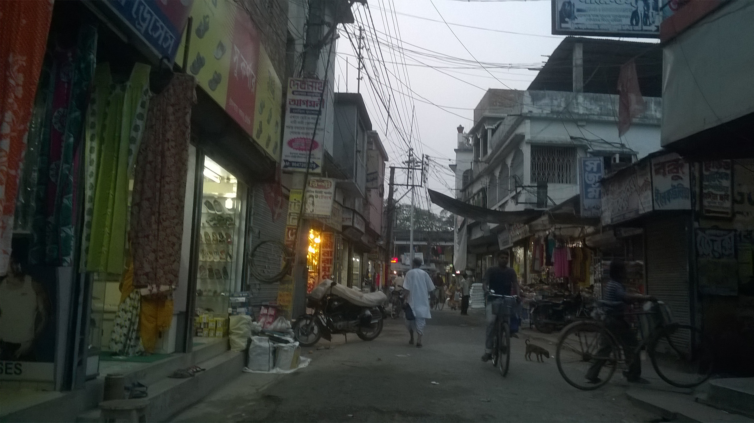 Chandpara Bazar Chourangi